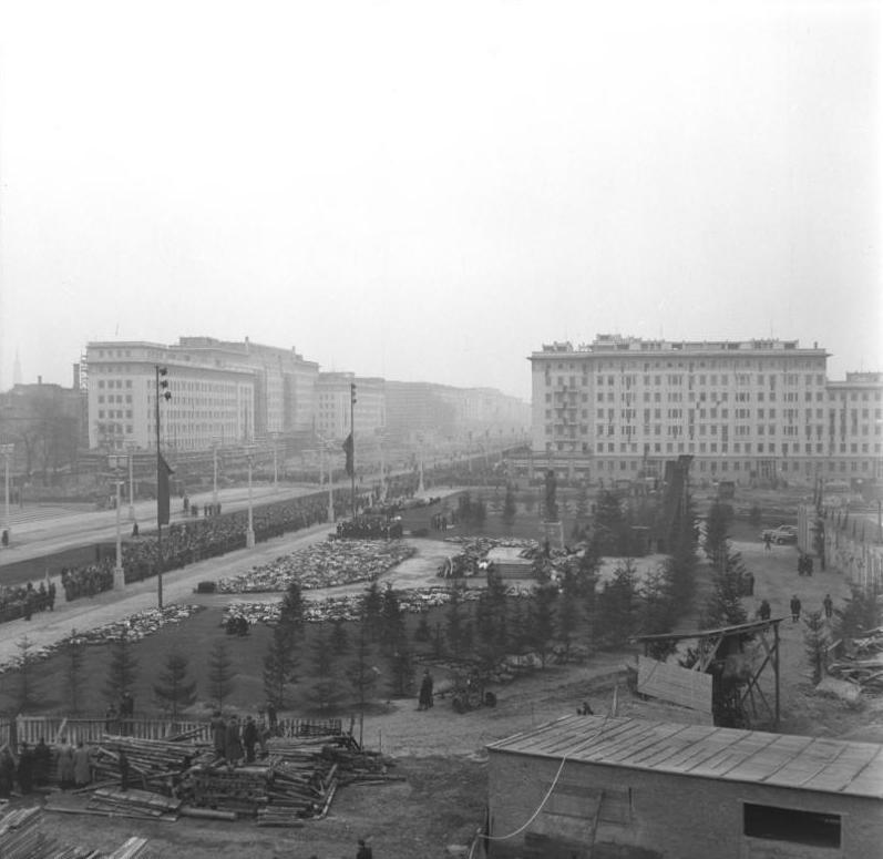 Berlin, Tod Stalins, Trauermarsch in der Stalinallee ADN-ZB/Archiv Trauermarsch der Berliner Werktätigen Am 9.3.1953, dem Tag der Beisetzung der sterblichen Überreste J.W. Stalins in Moskau, ehrten die Berliner Werktätigen den Generalsekretär des ZK der KPdSU (B) durch einen Trauermarsch zum Stalin-Denkmal in der Stalinallee. (Aufn.: Klein) Abgebildete Personen: Stalin, Josef W.: 1878-1953; Marschall, Vorsitzender des Ministerrates, Generalsekretär der KP, Sowjetunion (GND 118642499)